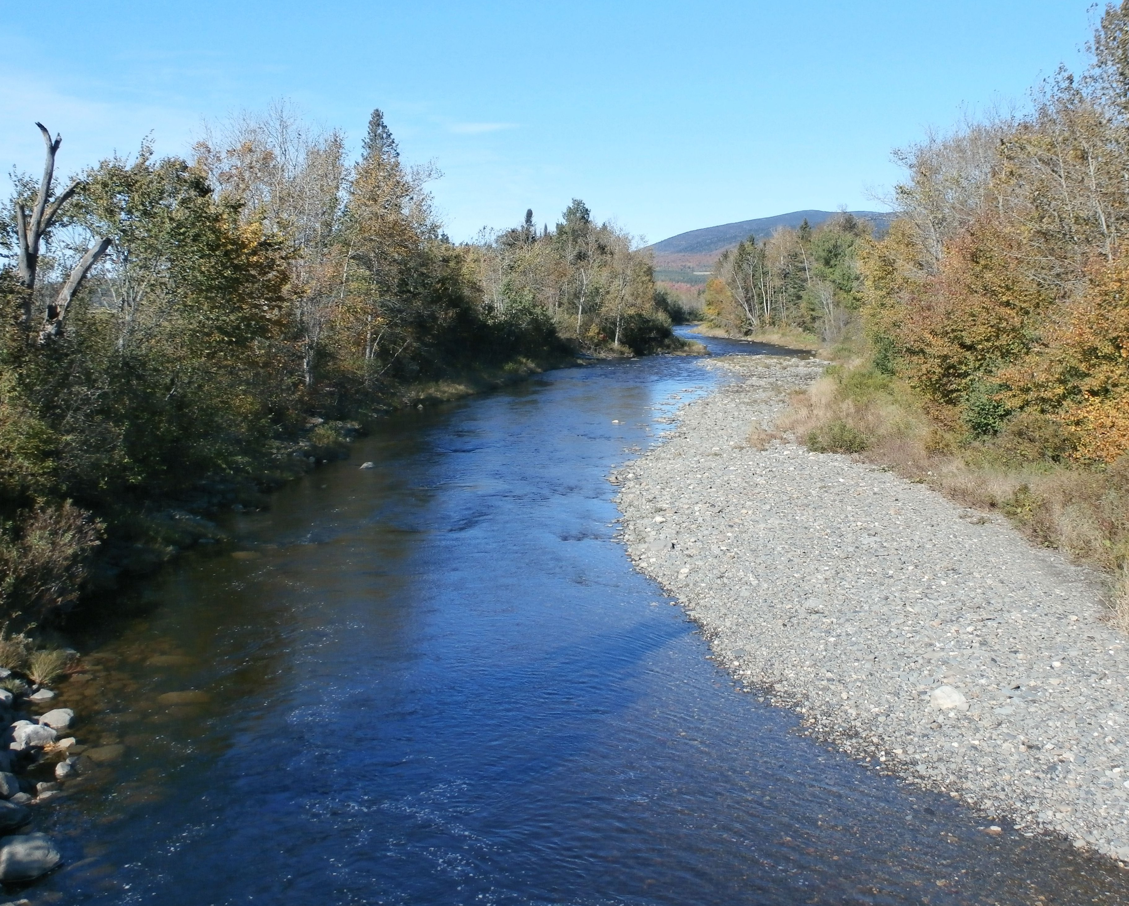 Rivière Ditton vue du pont sur le chemin du Petit-Canada près de La Patrie. Le mont Mégantic à l'arrièrre-plan.